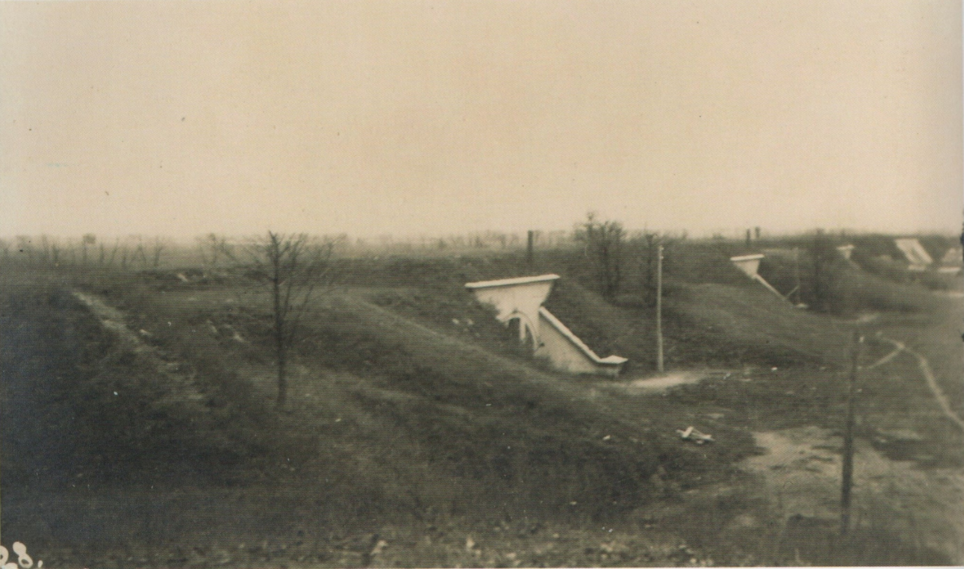 Уникальное фото форта времён его постройки.